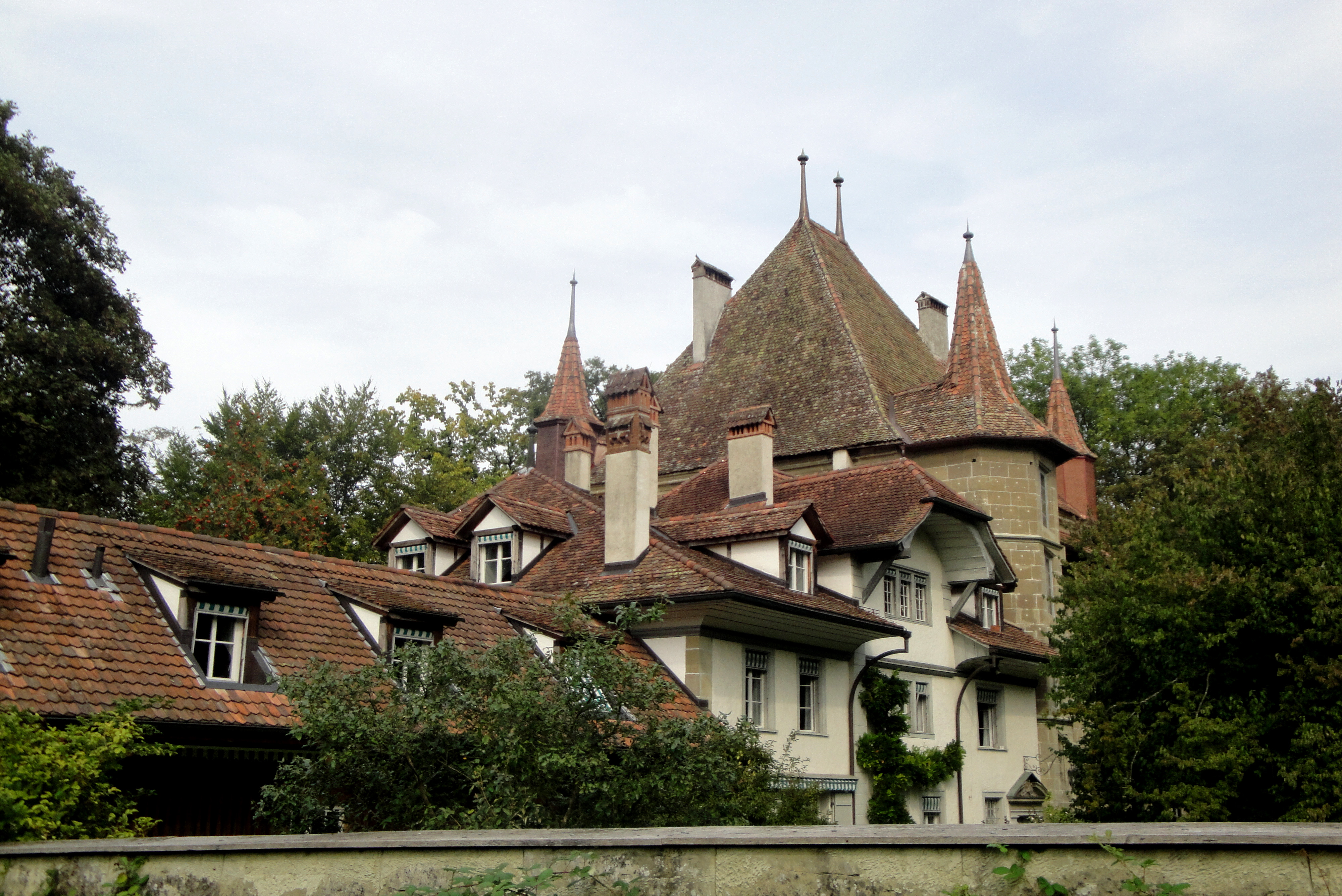 Bern, Schloss Holligen